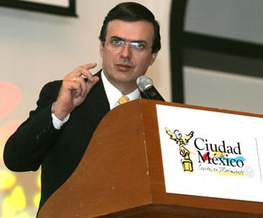 El Lic. Marcelo Ebrard en conferencia diaria celebrada en el Palacio del Ayuntamiento del Distrito Federal.